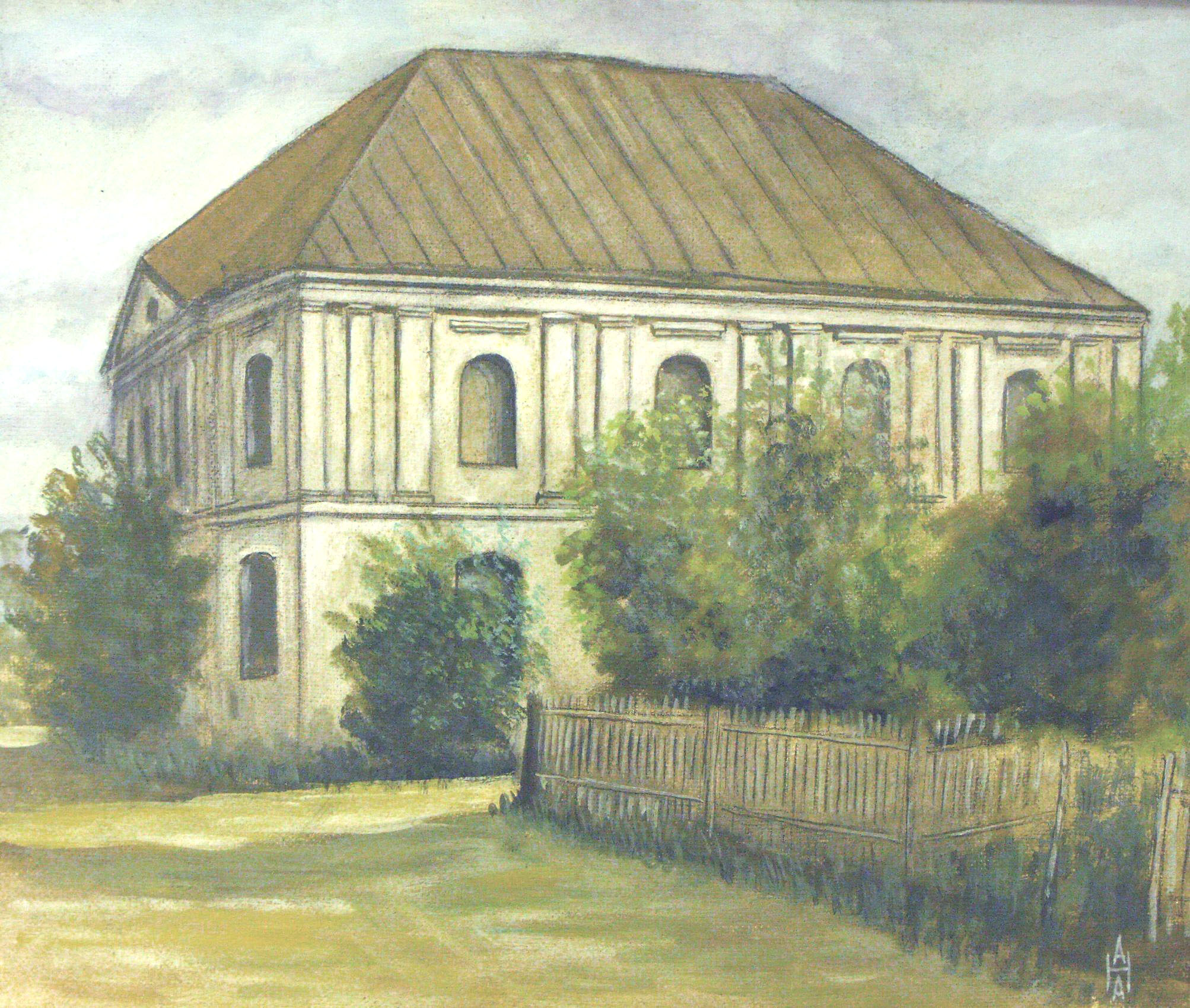 Столин, синагога, 1967 год. Яичная темпера. Художник - Анатолий Наливаев.